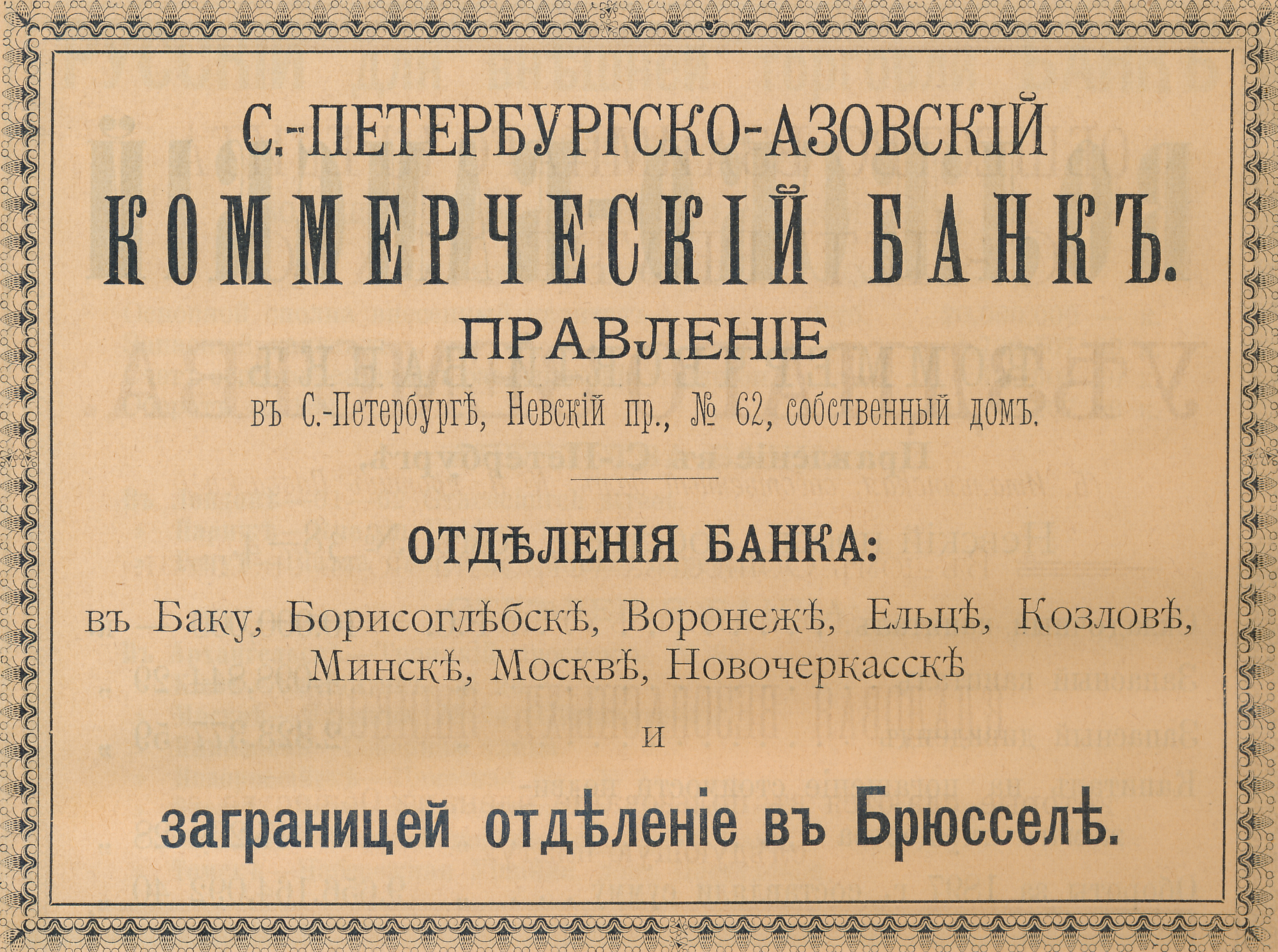 Реклама СПб-Азовского банка в справочнике "Весь Петербург", 1899 год, с. 48 рекламной вкладки.